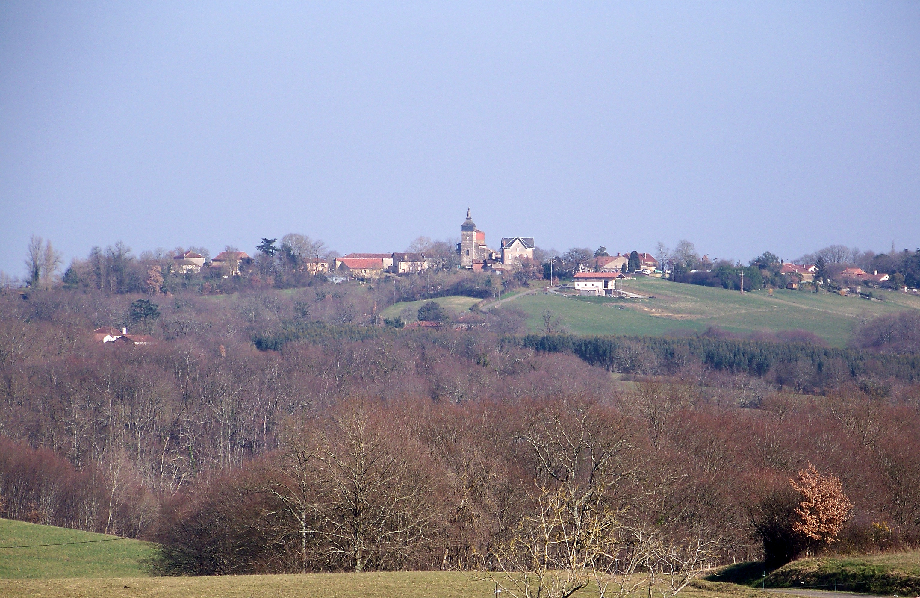 Le village d'Avéron-Bergelle, dominant la vallée du Midouzon, vu depuis la route de Loubédat.